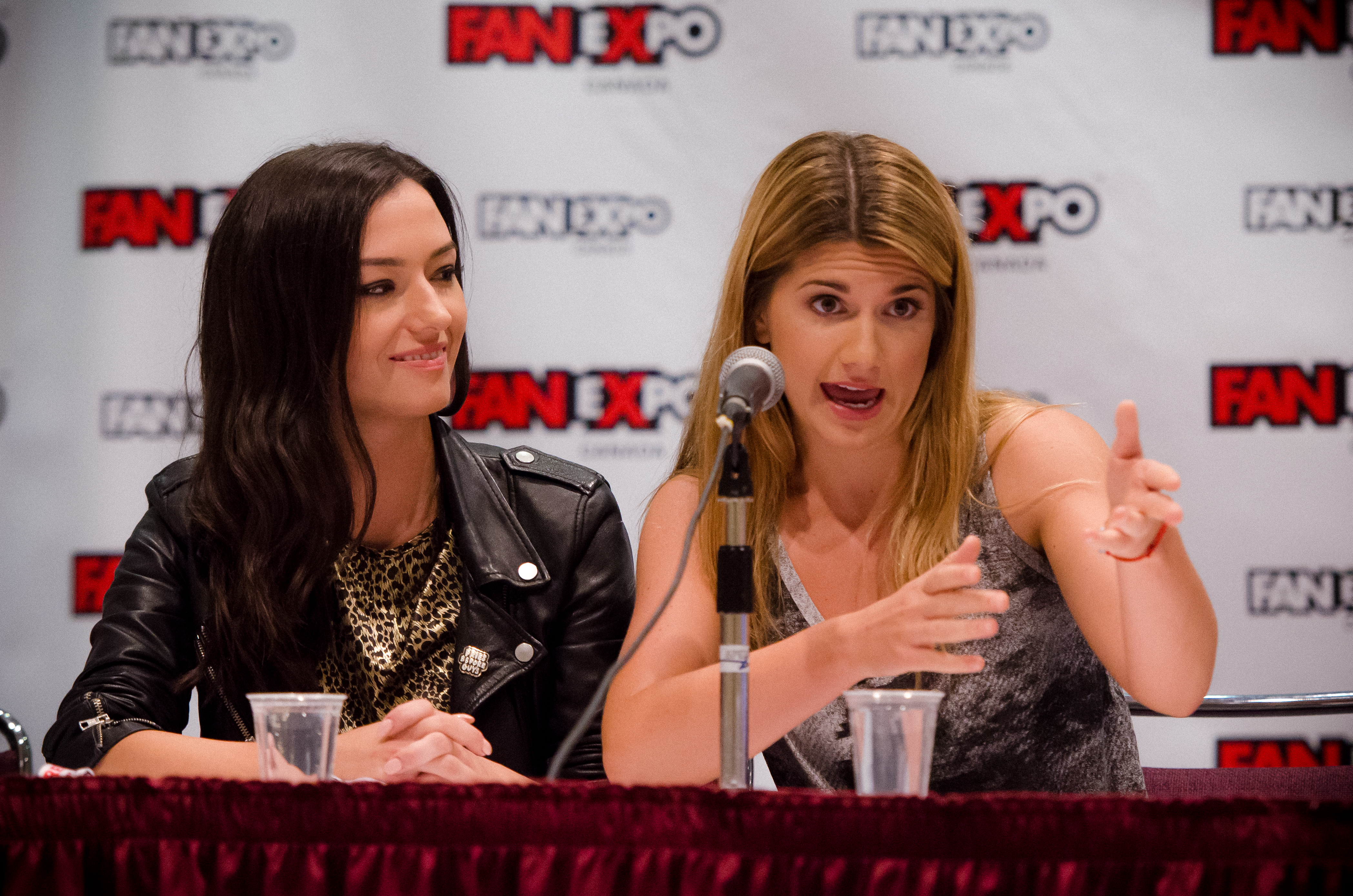 Gesture